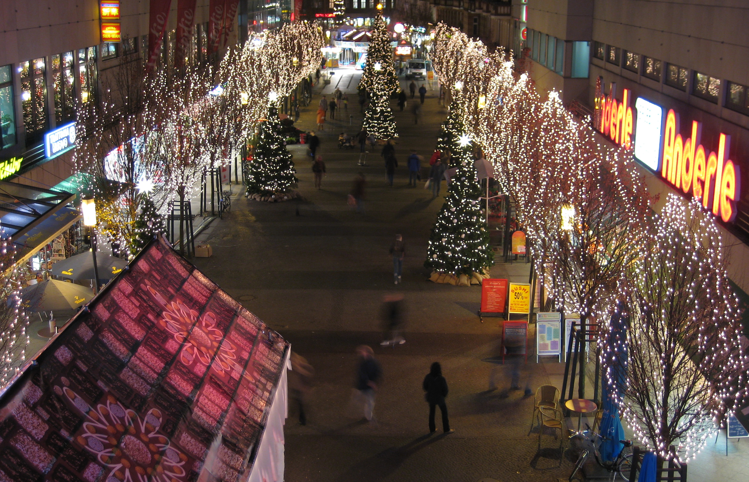 Weihnachtsbeleuchtung in der Fußgängerzone Gorkistraße in Berlin-Tegel, fotografiert von der Parkdeckverbindung über dem Brückenrestaurant.